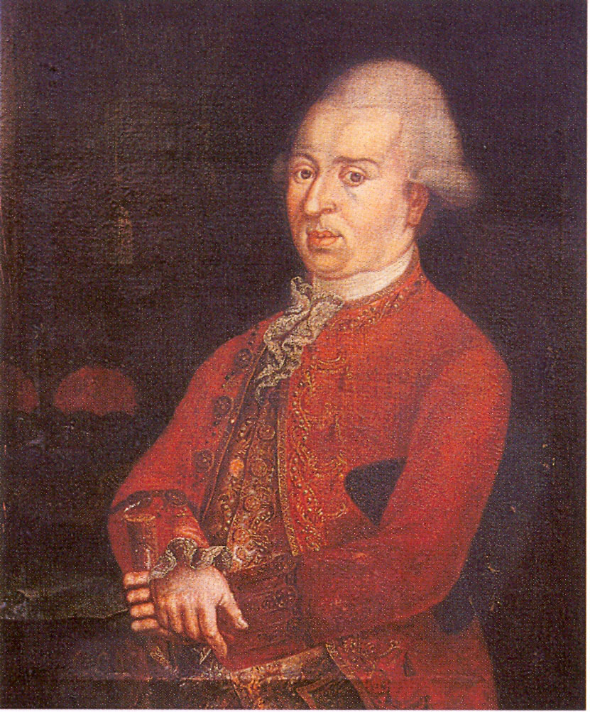 Portrait of Joseph Maria Benedikt von Fürstenberg (1758-1796)